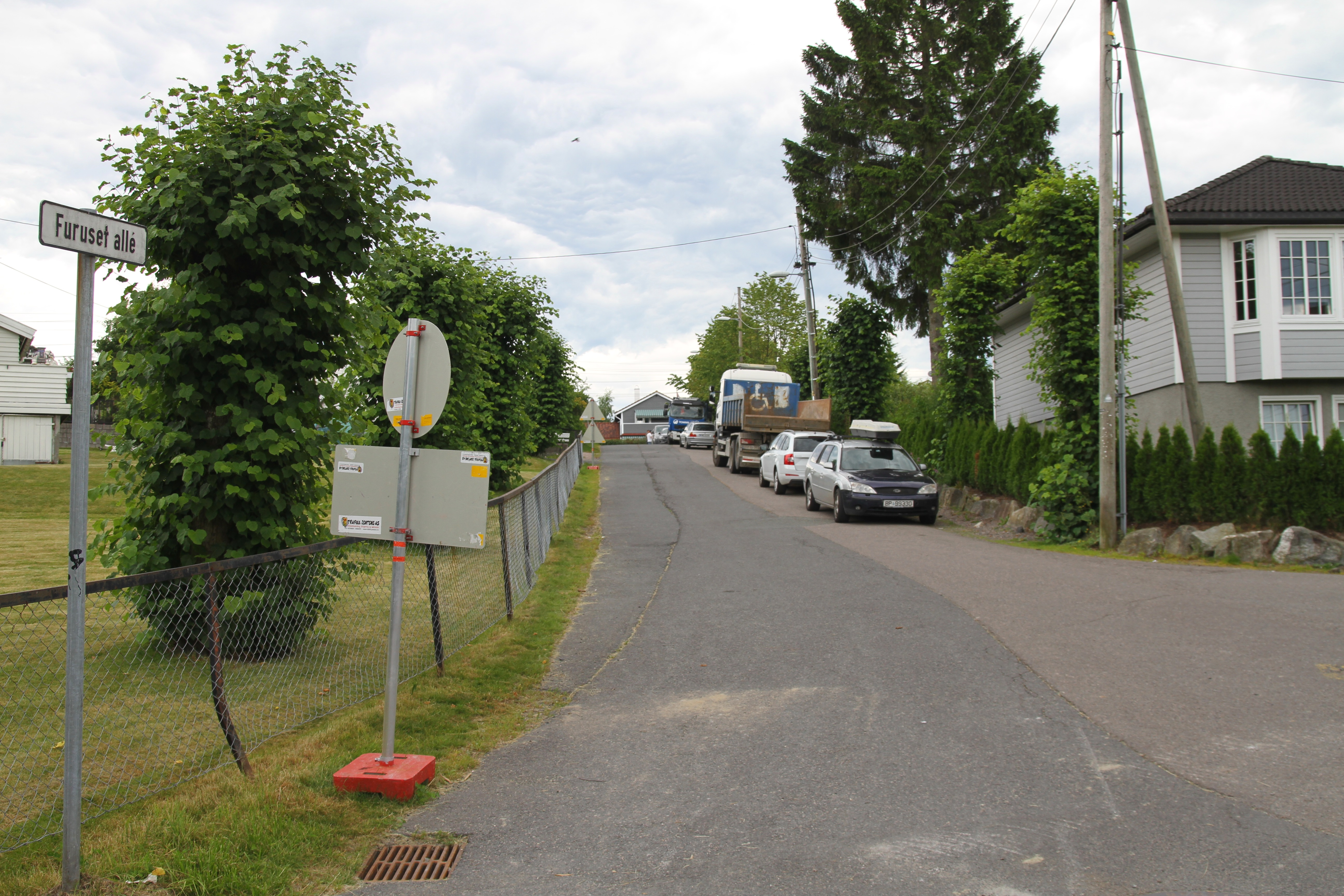 Furuset allé i Oslo